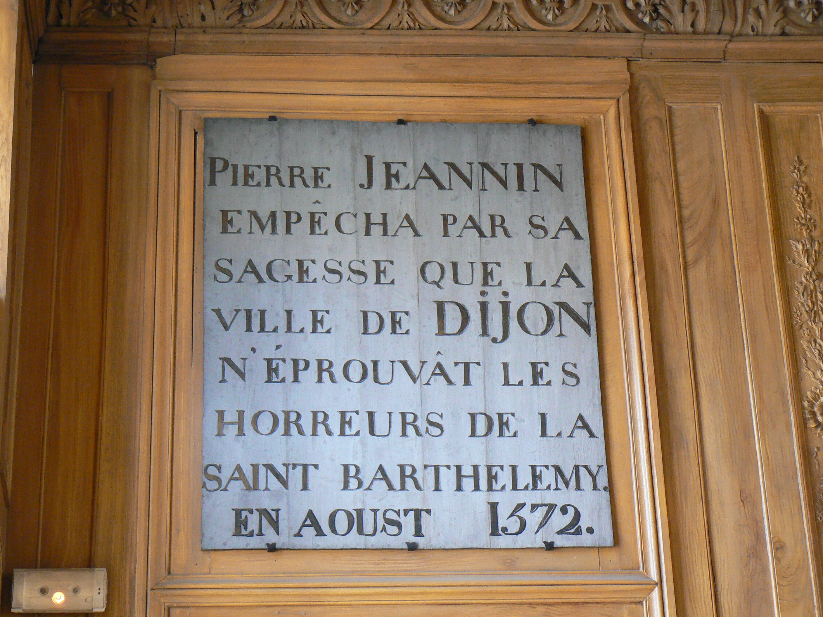 Détail de la plaque rendant hommage à Pierre Jeannin dans l'ancienne salle du conseil municipal de l'Hôtel Rolin (Dijon), actuelle salle de lecture des archives départementales.